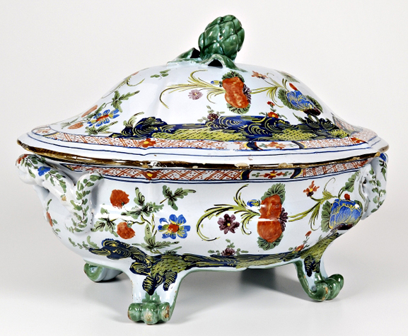 Zuppiera con decorazione "al garofano". Faenza, Manifattura Ferniani XVIII secolo.